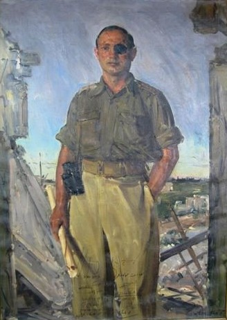 Ludwig Blum, an Israeli painter (1891- 1974) painted portraits such as High Commissioners of Palestine, Abdullah I of Jordan, Moshe Dayan לודוויג בלום (1891 - 1974) היה צייר ישראלי ואחד מאחד ממייסדי "מכבי" בצ'כוסלובקיה. בלום היה צייר אקדמי שצייר תמונות ריאליסטיות בסגנון אירופי דייקני. הרבה לצייר תמונות מנופי ארץ ישראל. הנושאים האהובים עליו היו ירושלים, מדבר יהודה וים המלח. הוא נחשב לצייר מקובל ביותר בתקופת היישוב משה דיין, 1949